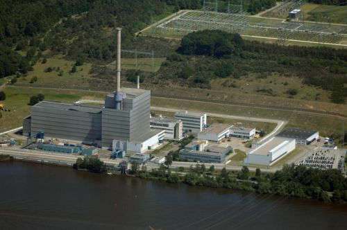 Geesthacht 23.06.2009 Das Kernkraftwerk Krümmel (Abk.: KKK oder auch AKW Krümmel) liegt südöstlich von Hamburg an der Elbe, direkt am Geesthachter Ortsteil Krümmel. Es wird von der Kernkraftwerk Krümmel GmbH & Co OHG betrieben. Gesellschafter sind E.ON Kernkraft (50 %) und Vattenfall Europe Nuclear Energy GmbH (50 %). Das Kernkraftwerk befand sich aufgrund eines Transformatorenbrand vom 28. Juni 2007 bis zum 19. Juni 2009 nicht im Betrieb.